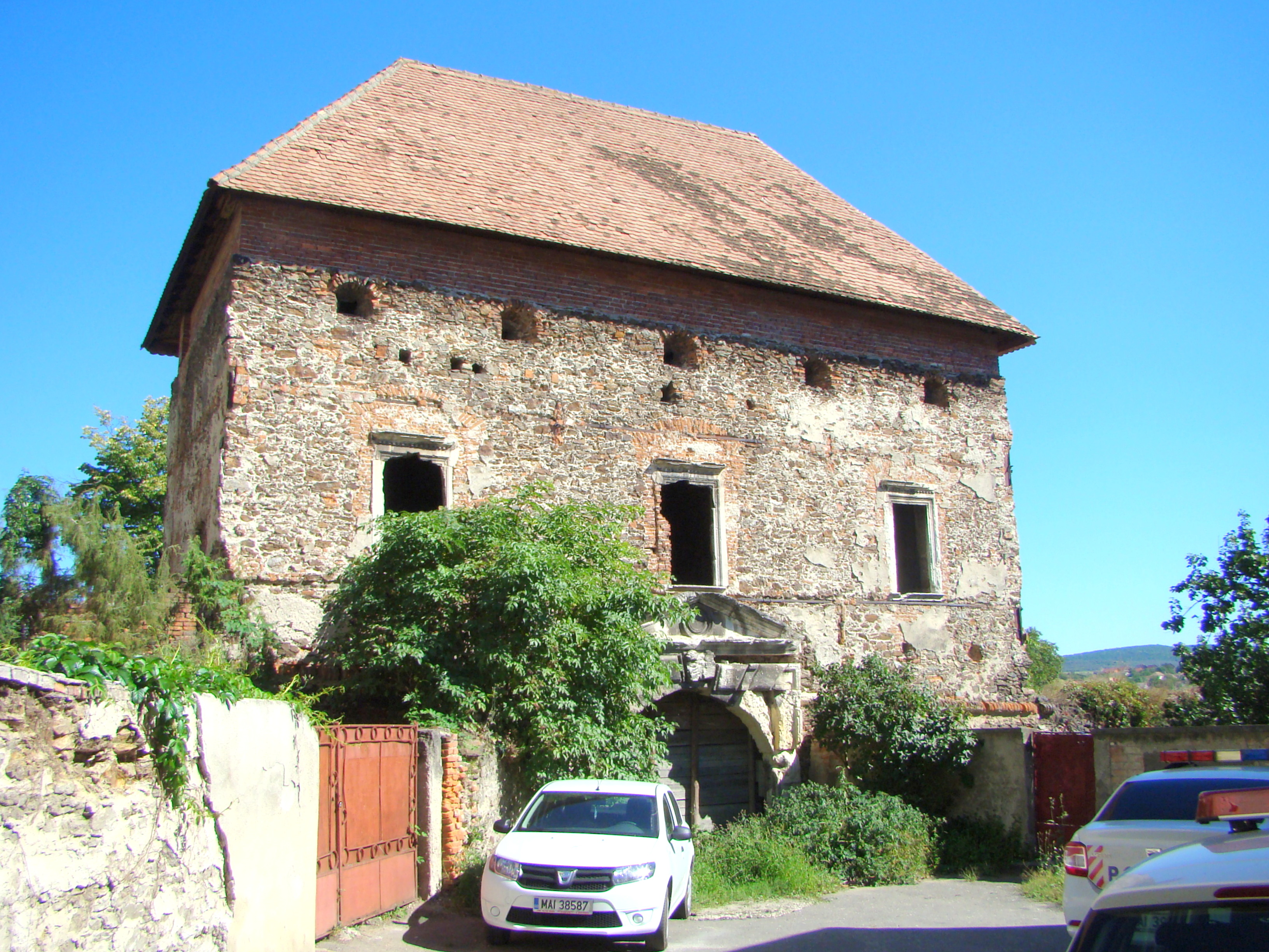 Bastioane, oraș Șimleu Silvaniei, Str. Bathory Stefanus 1 01